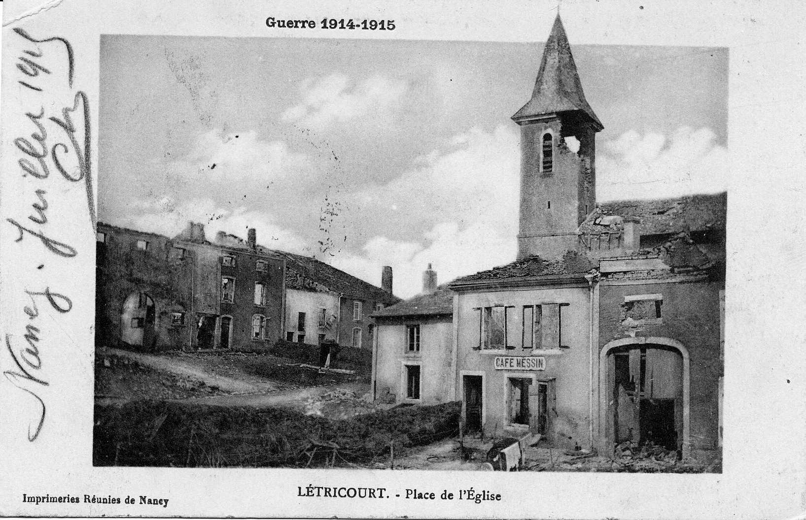 Commune Letricourt (Meurthe-et-Moselle) détruite pendant la Première Guerre mondiale. Conservé aux Archives de Rennes, 100 Fi 571